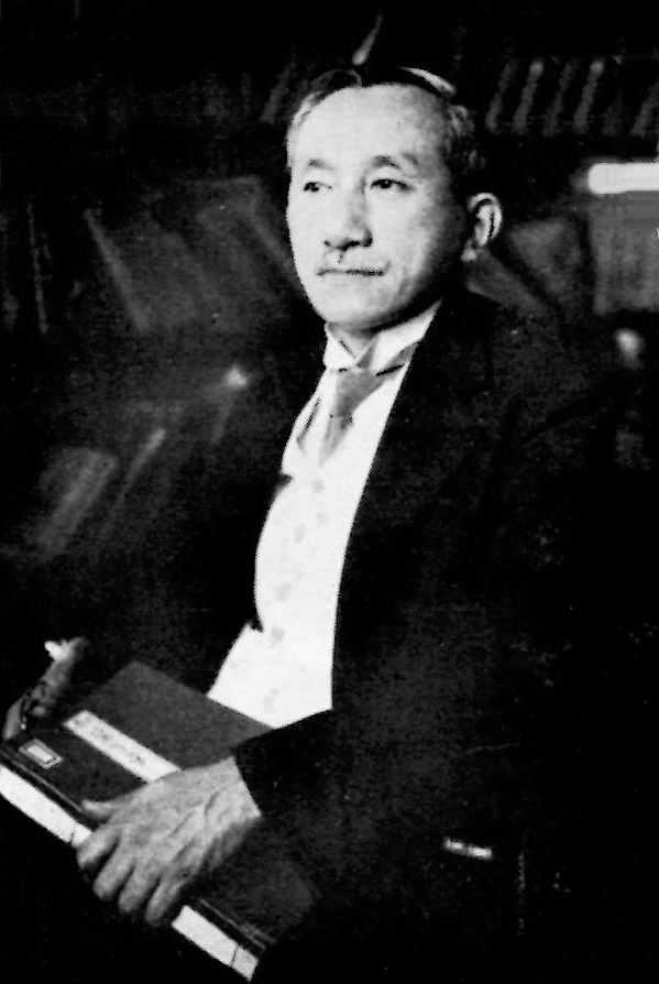 新村出